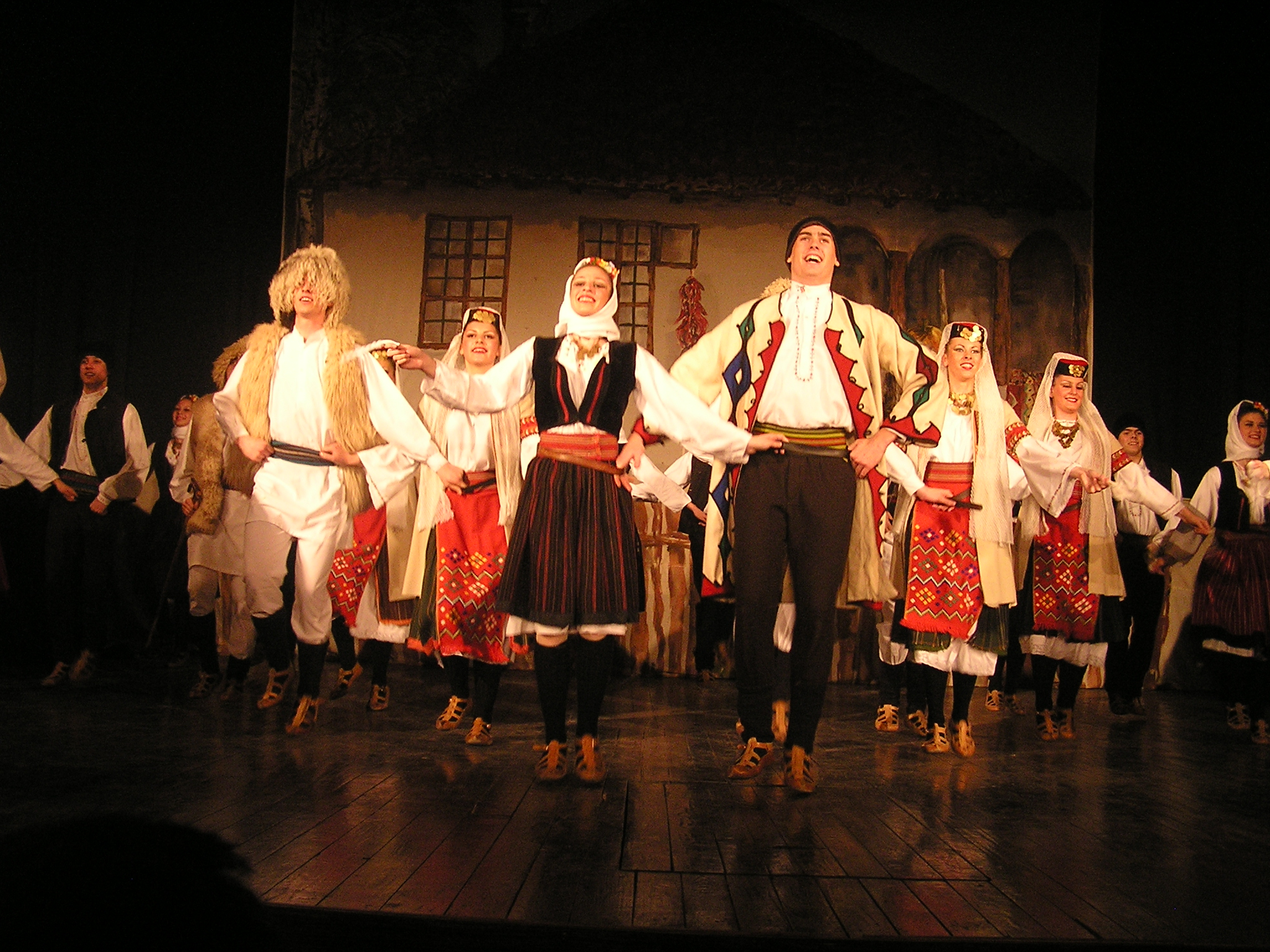 Godišnji koncert 24. decembar 2005./ Nova Pazova